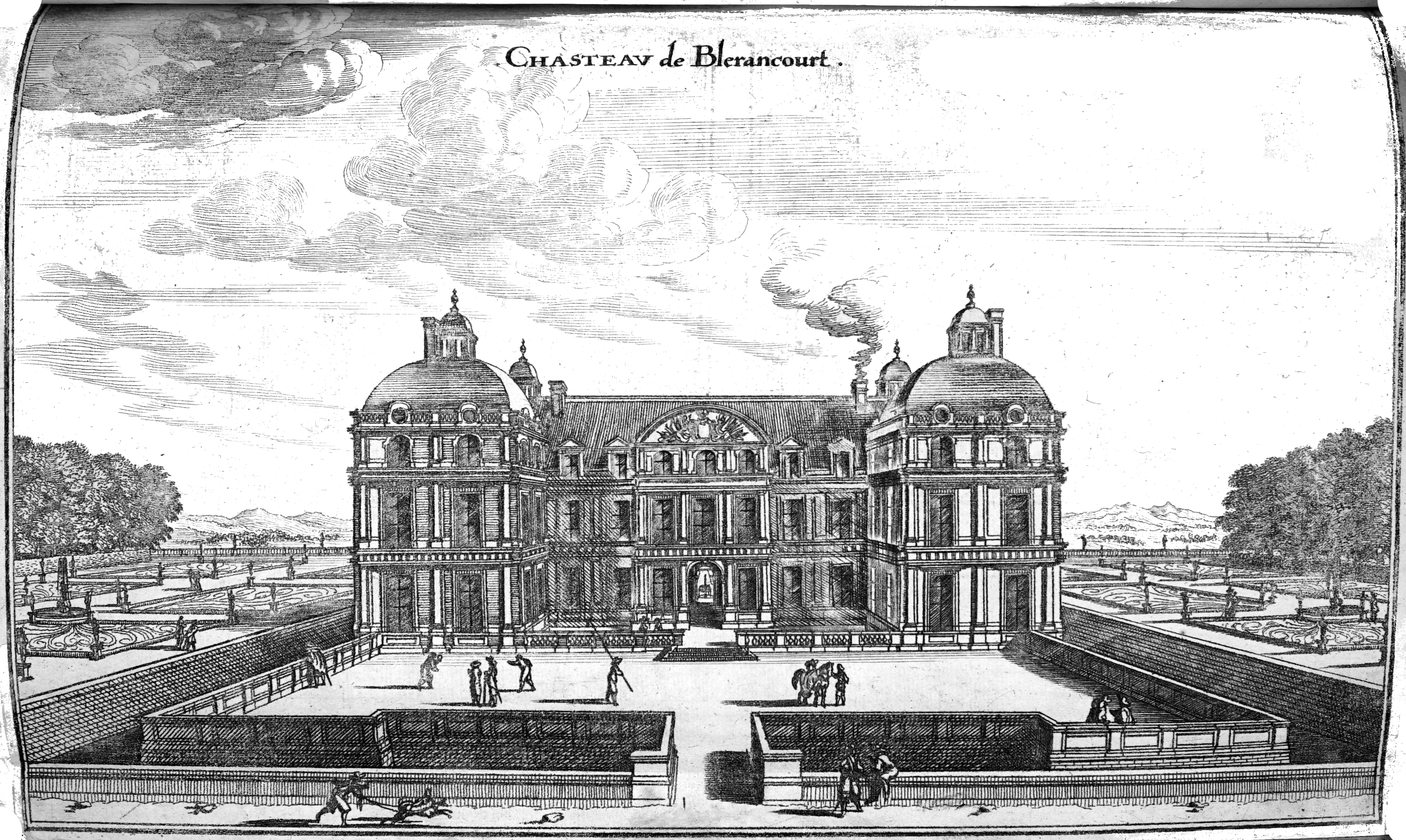 extrait de "TOpographia Galliae".